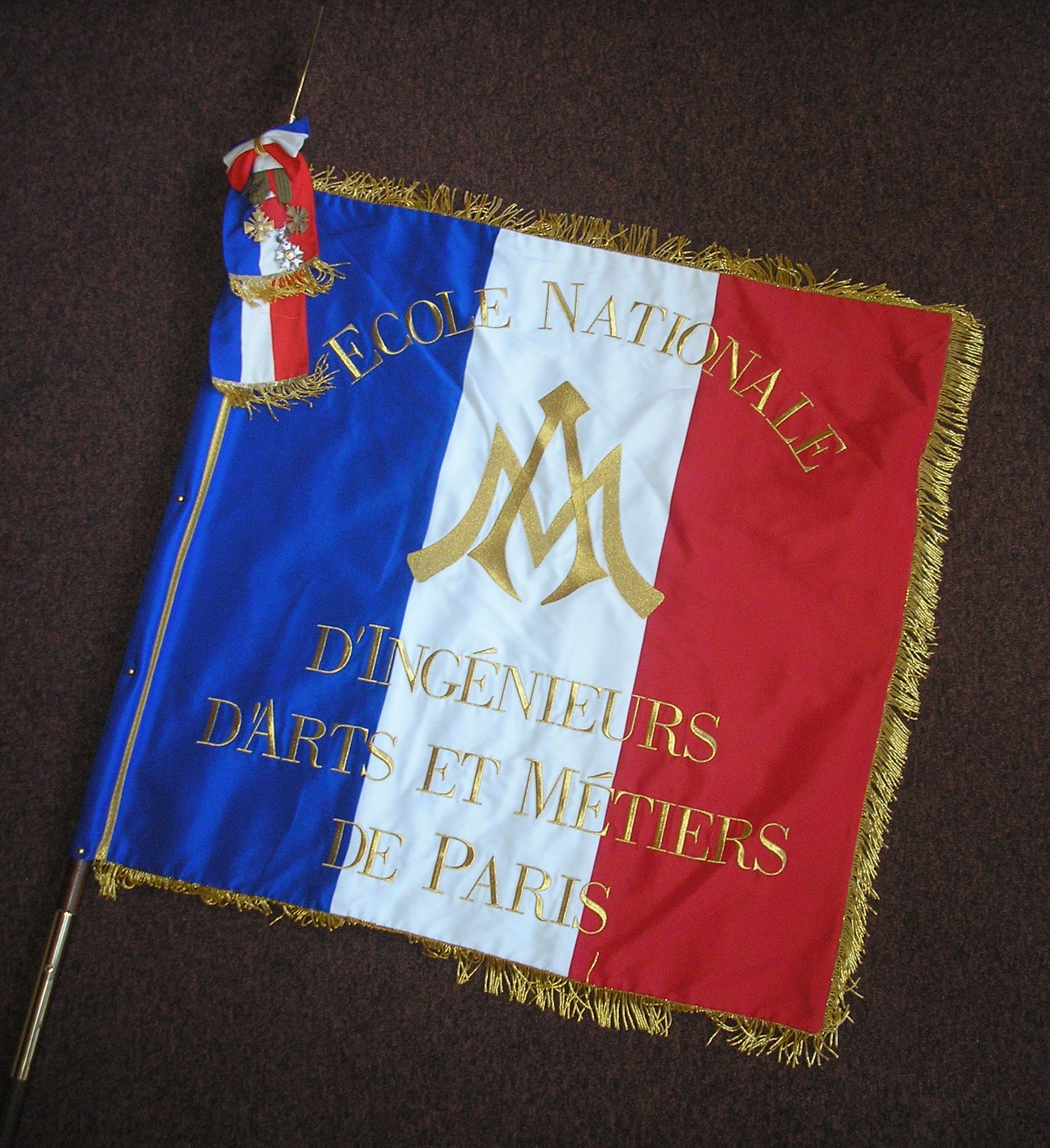 Drapeau de l'Ecole Arts et Métiers ParisTech, portant les décorations de l'Ecole sur sa cravate.